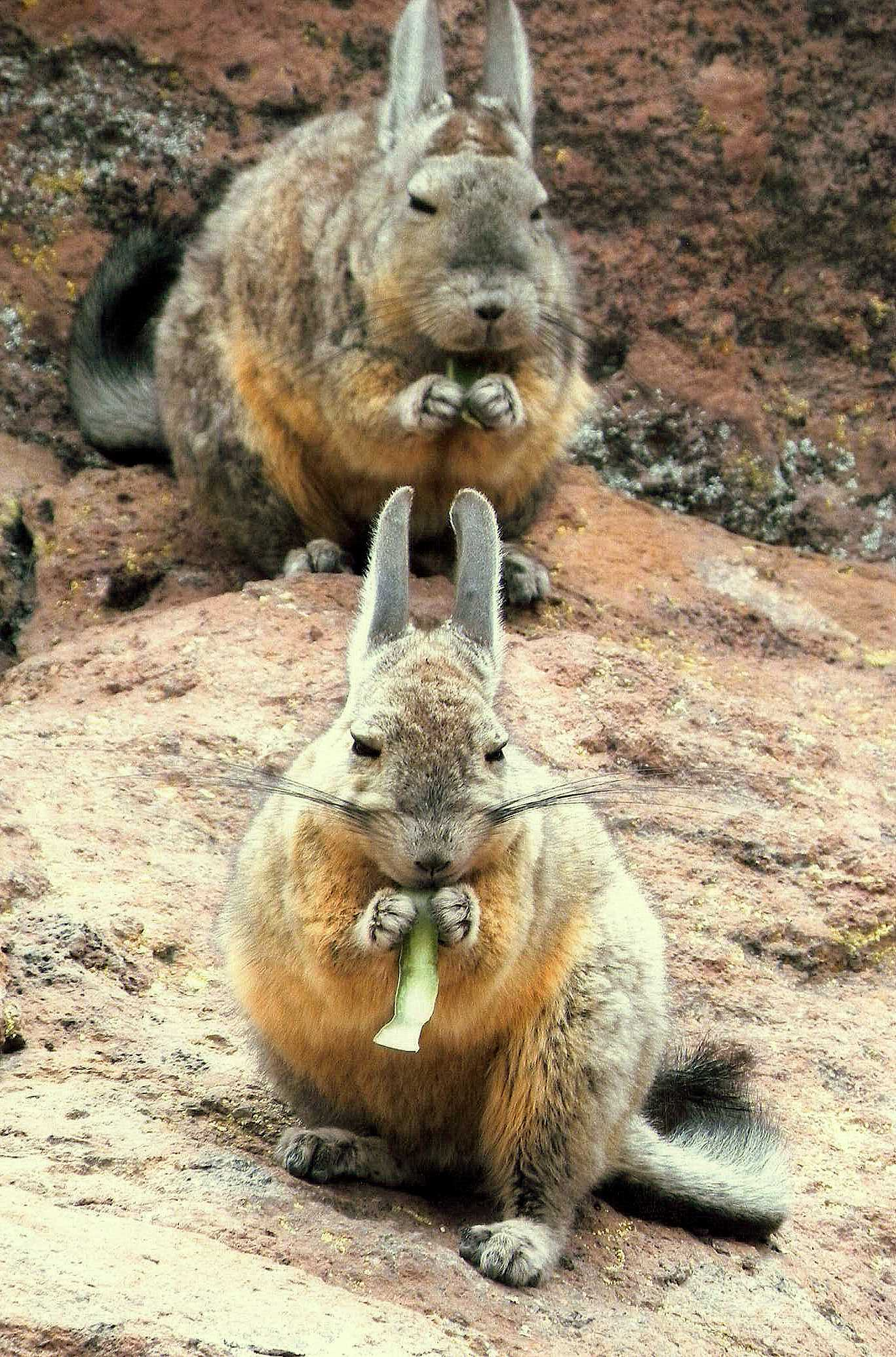 Vizcachas, camino al Volcán Ollagüe, Bolivia